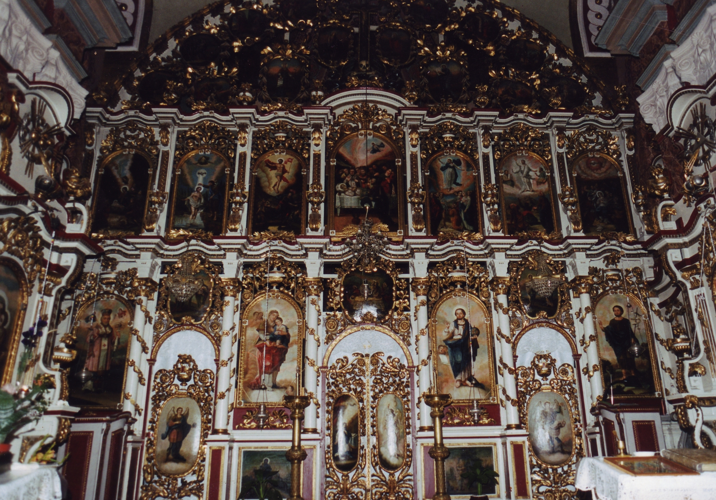 2.9 MB Iconostasul bisericii sculptat în lemn de tei în stil rococo, într-un format baroc autentic.